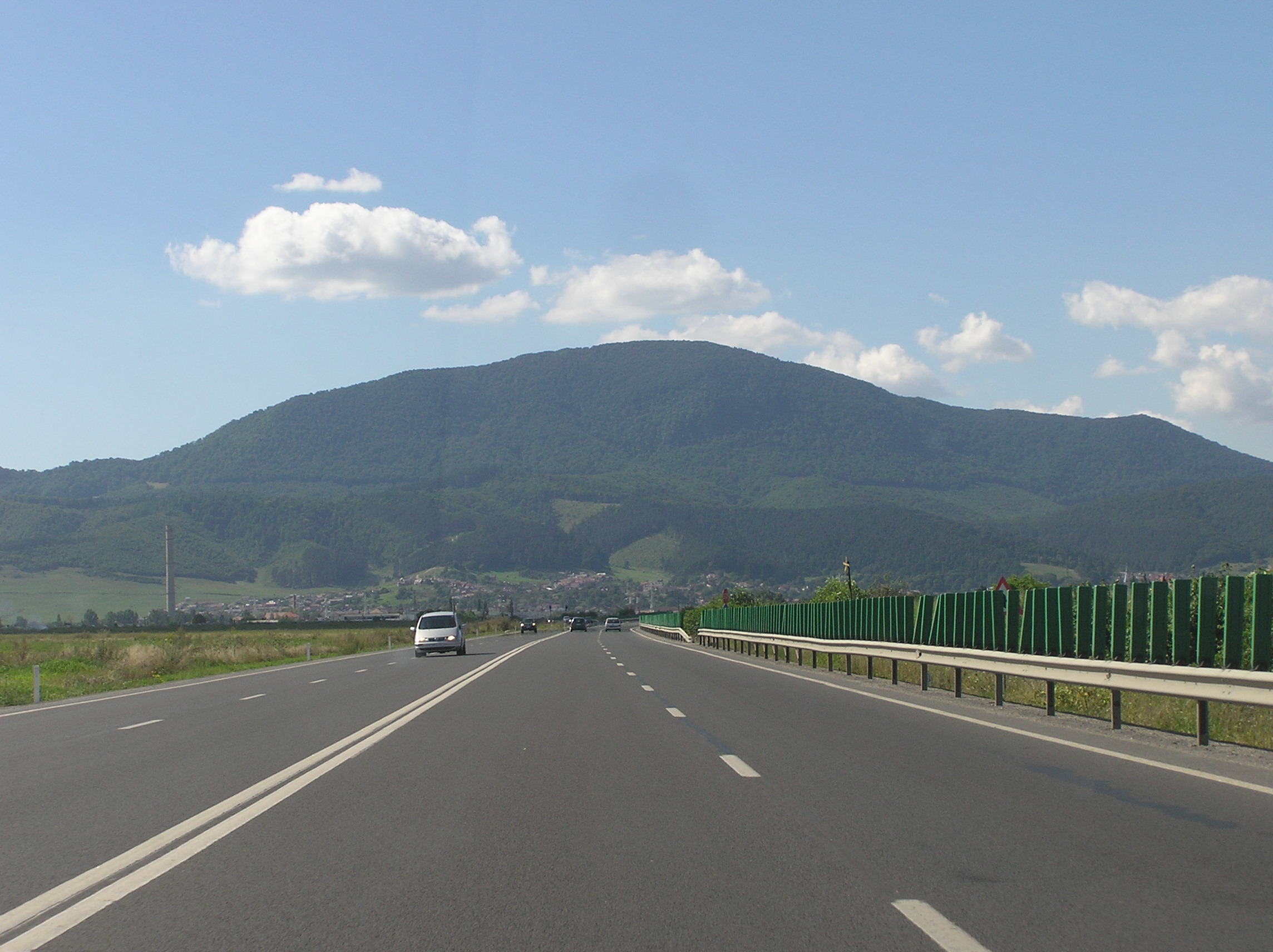 Die Europastraße 68 in Richtung Codlea / Zeiden, Siebenbürgen, Rumänien.